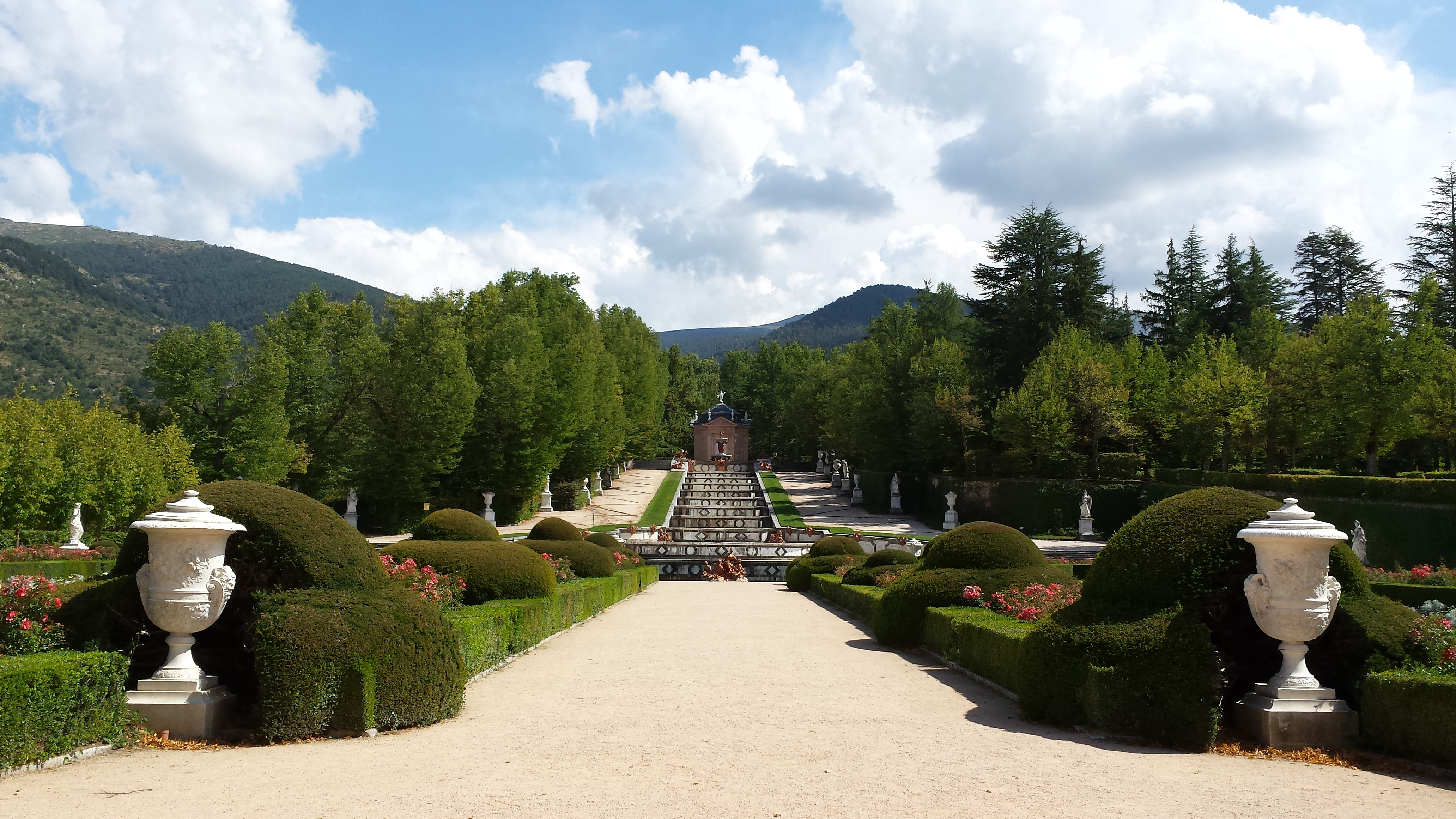 Kaskadenbrunnen im Park La Granja San Ildefonso (weit)